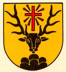 Wappen von Le Noirmont Kanton Jura Schweiz